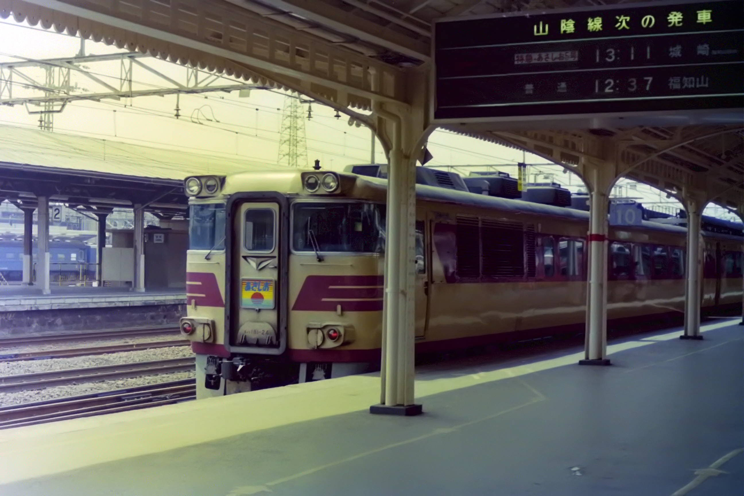 京都駅に停車するキハ181 特急「あさしお」